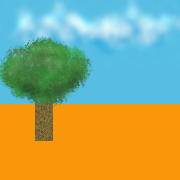 Image de base pour illustration du MIP mapping